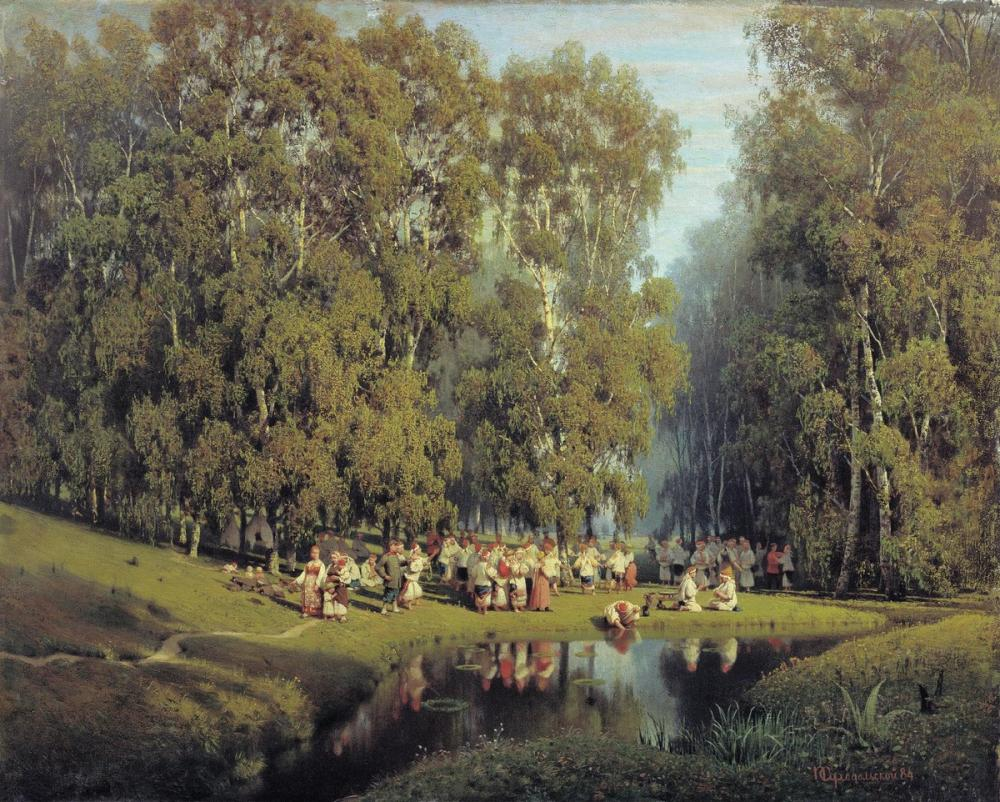 Троицын день. 1884; Холст, масло; 66,5 x 82; Национальный художественный музей Республики Беларусь